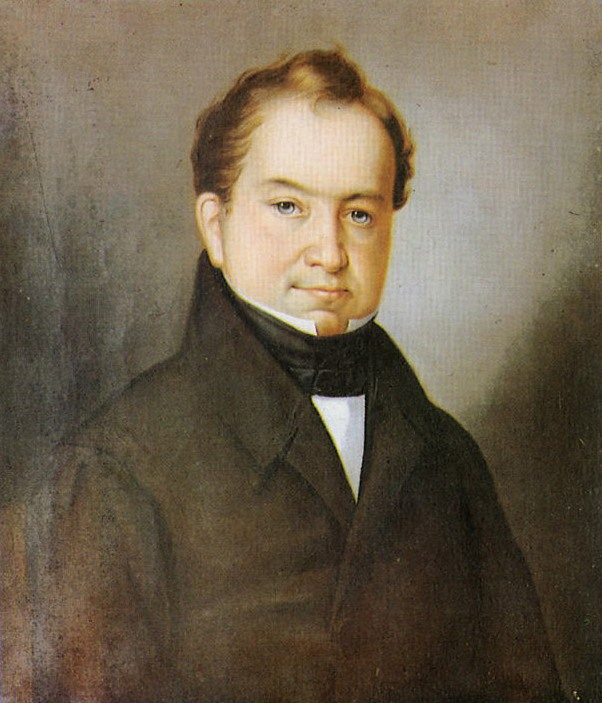 Граф Иван Алексеевич Мусин-Пушкин (21.09.1783 - 12.06.1836), генерал-майор, гофмейстер, был женат на княжне Марии Алексеевне Урусовой (1801 - ранее июня 1853).